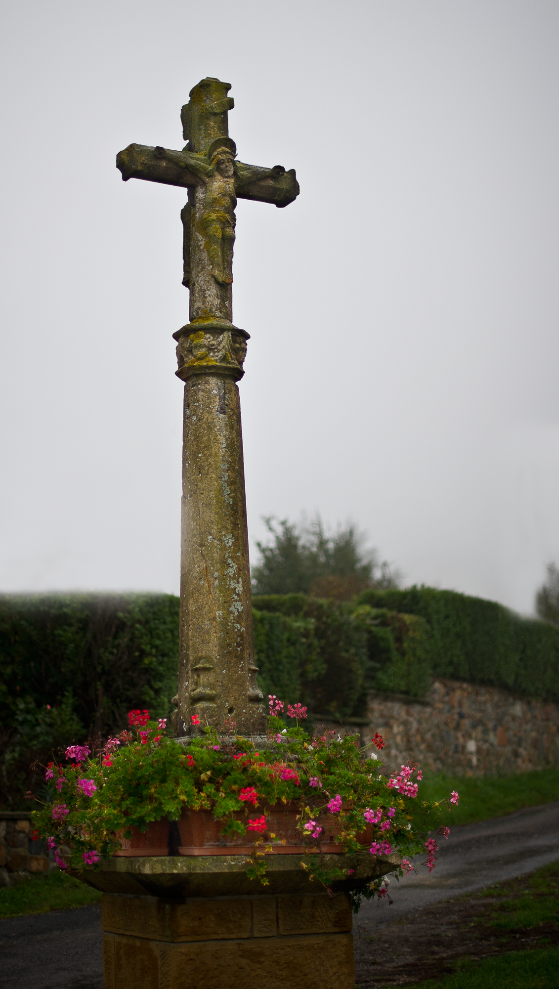 Croix de Bibost, Le PlaninLe Trève (Inscrit, 1926) .